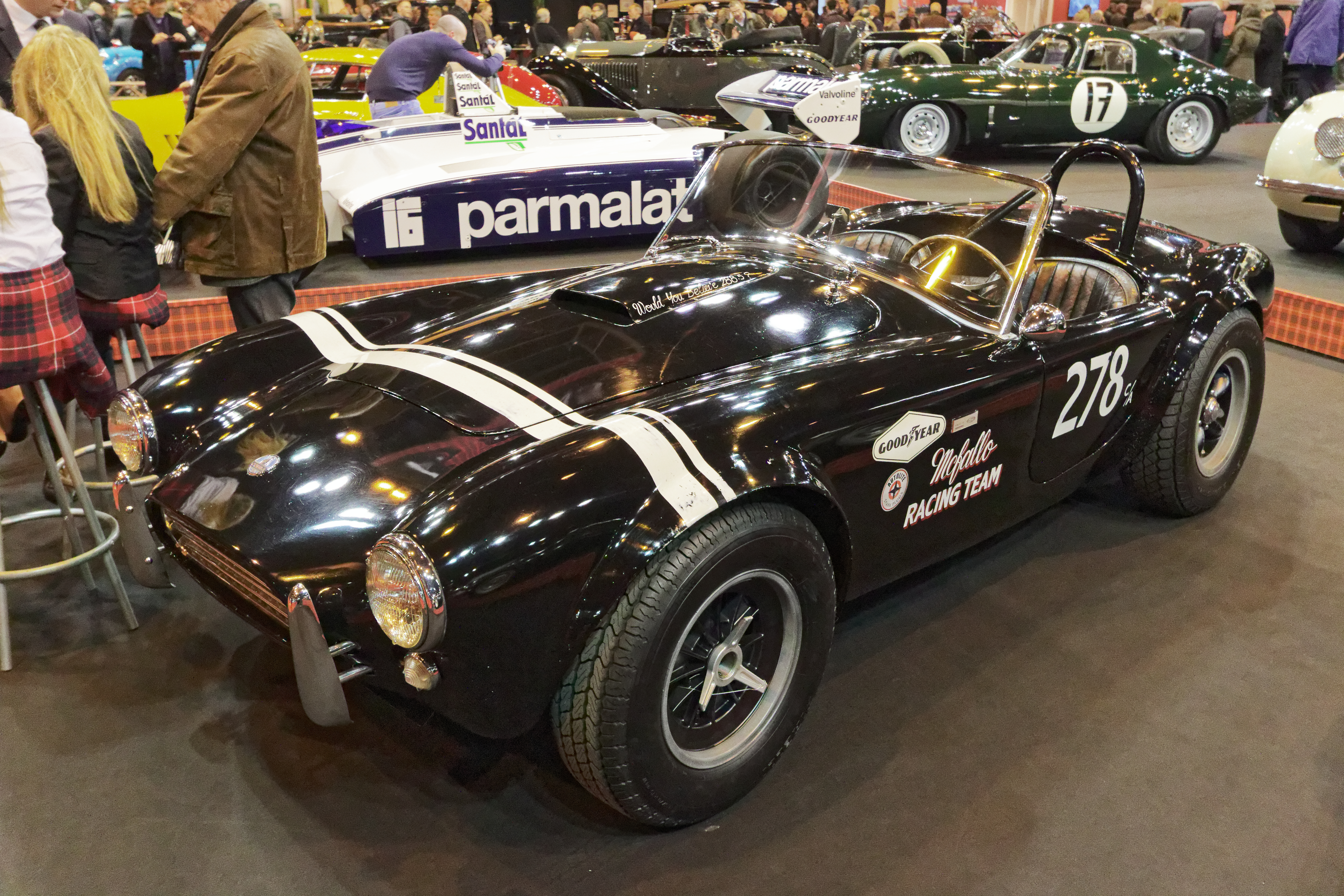 Une AC Cobra 289 Dragon Snake de 1963 exposée lors du salon Rétromobile 2018. Chassis: CSX2075